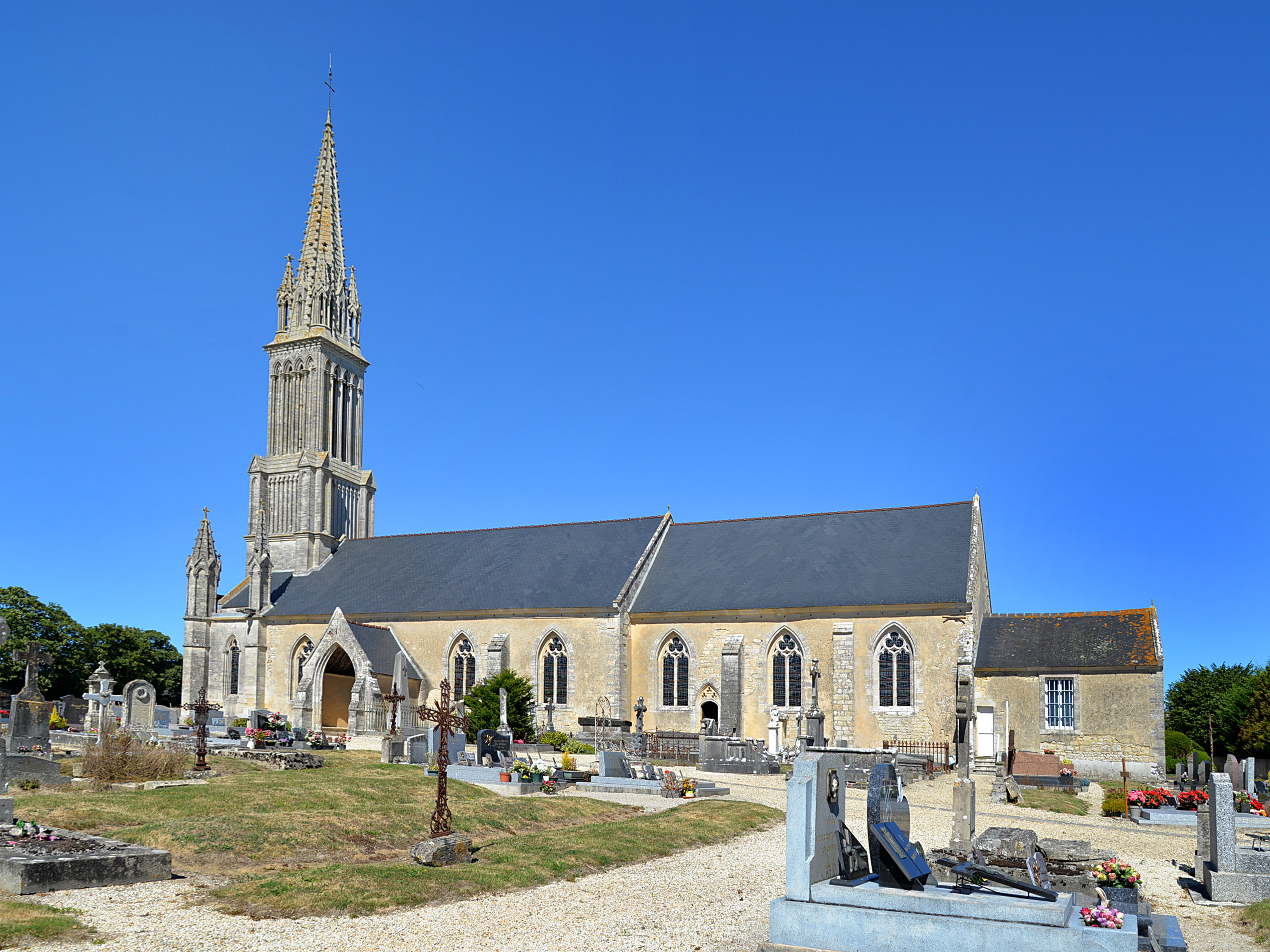 Écrammeville (calvados)